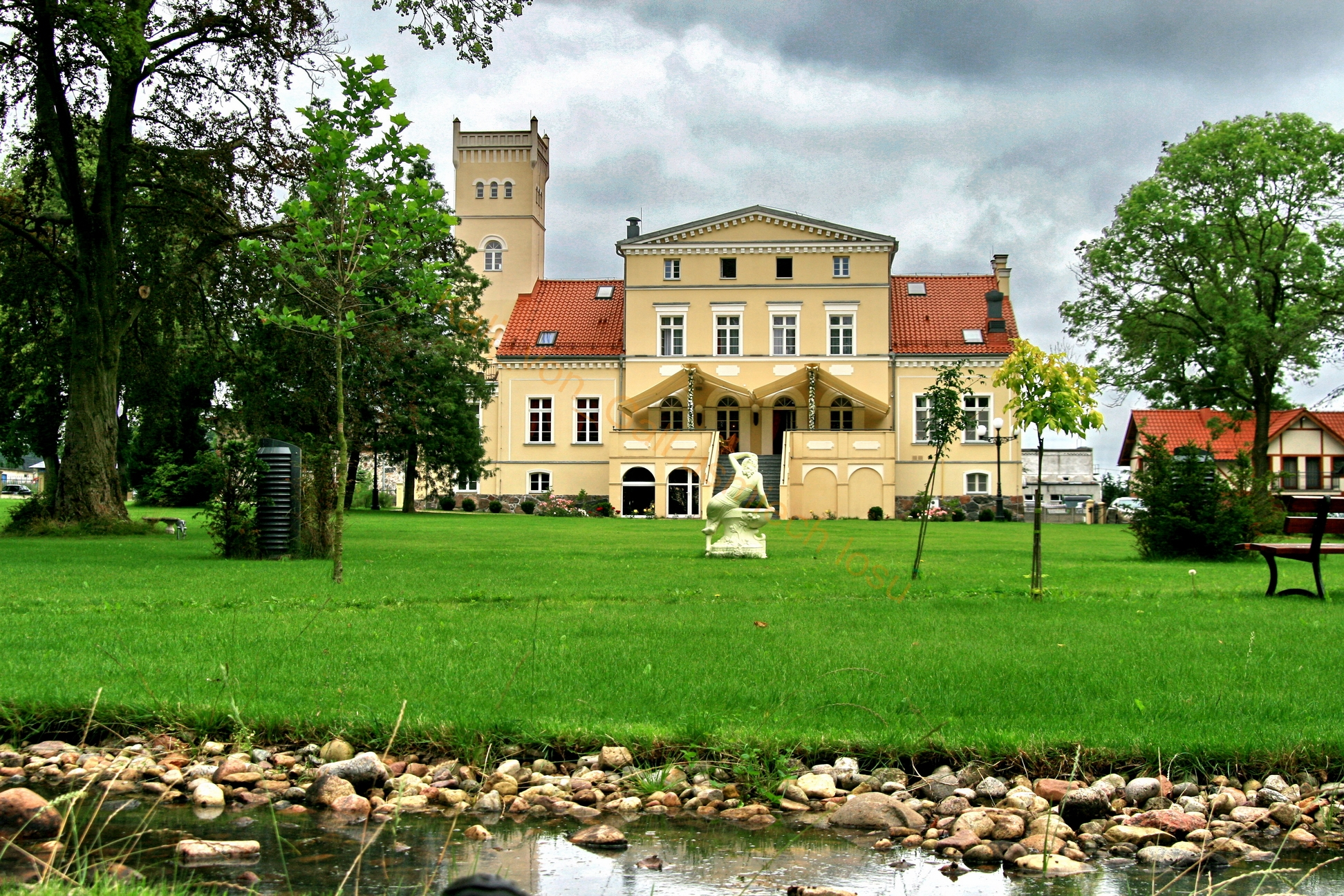 Rekowo Górne, ul. Lipowa 24 - pałac, obecnie hotel, poł. XIX